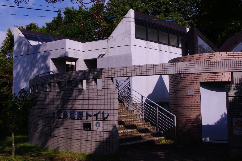 上江津湖・美粧化トイレ